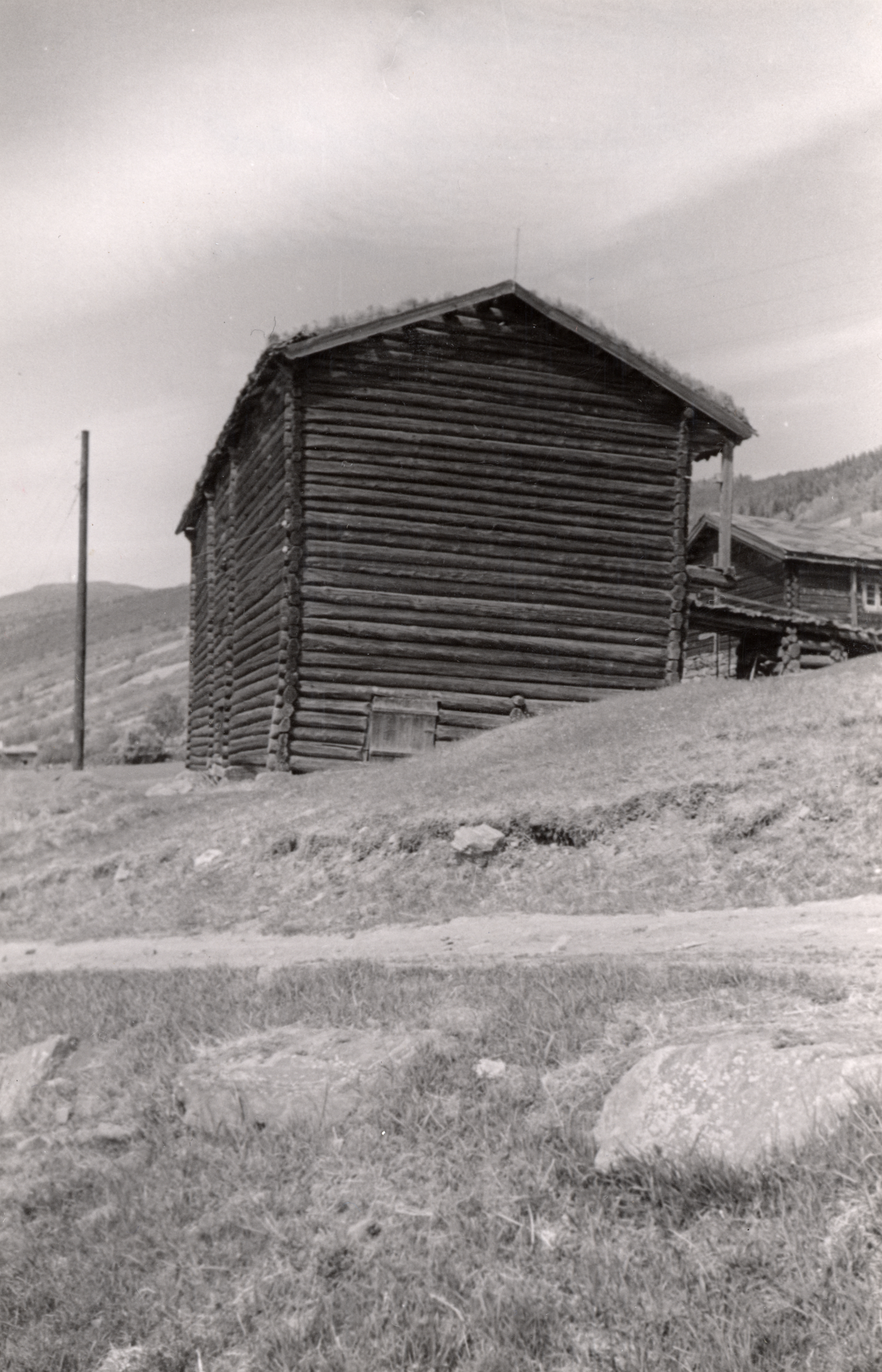 Hæringstad, Heringstad i Heidal, Oppland Nedre låve